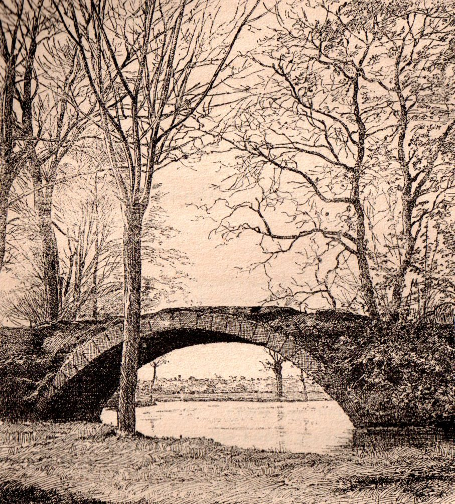 Pont Calvin à Asnières-lès-Bourges (Cher, France).